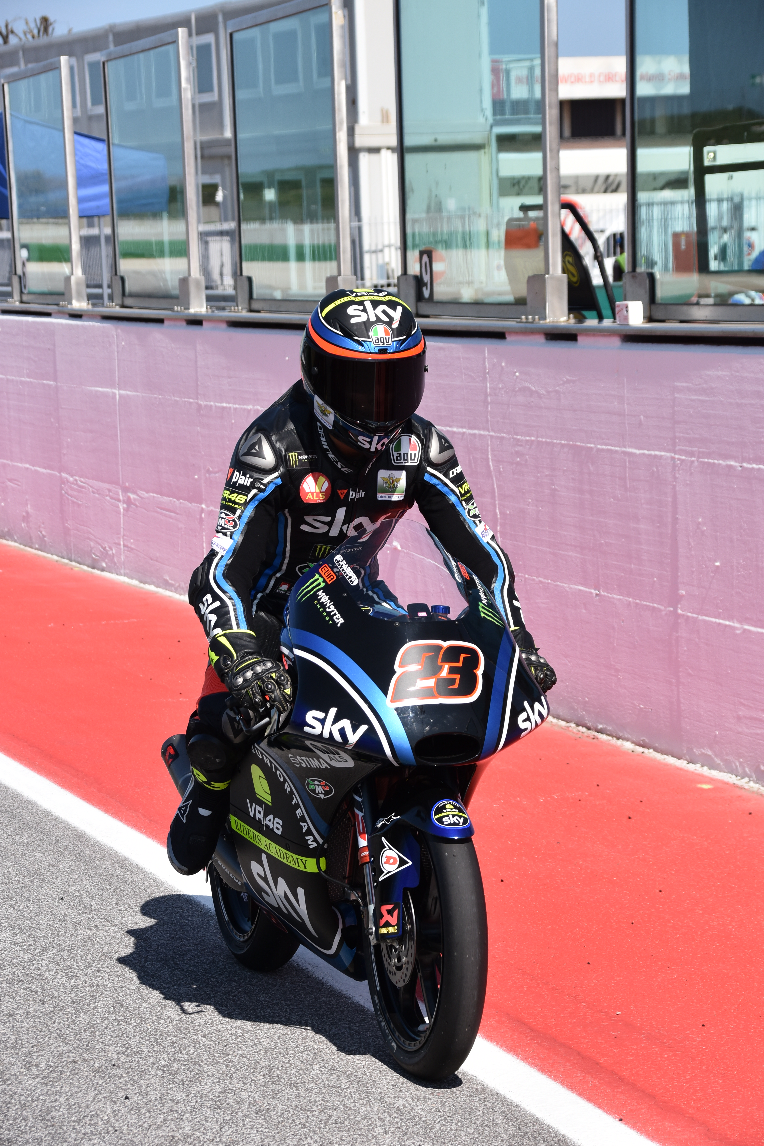 Elia Bartolini si schiera in griglia nella prima gara del CIV a Misano nel 2019